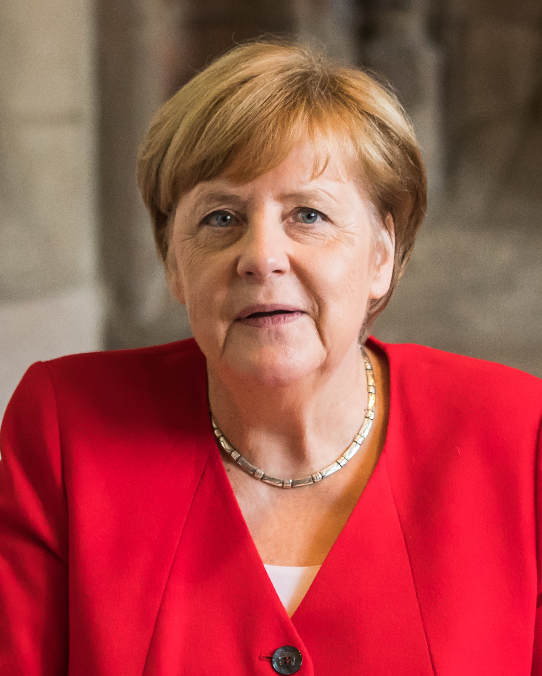 Besuch der Bundeskanzlerin Angela Merkel im Rathaus Köln Foto: Bundeskanzlerin Merkel trägt sich in das Goldene Buch der Stadt Köln ein